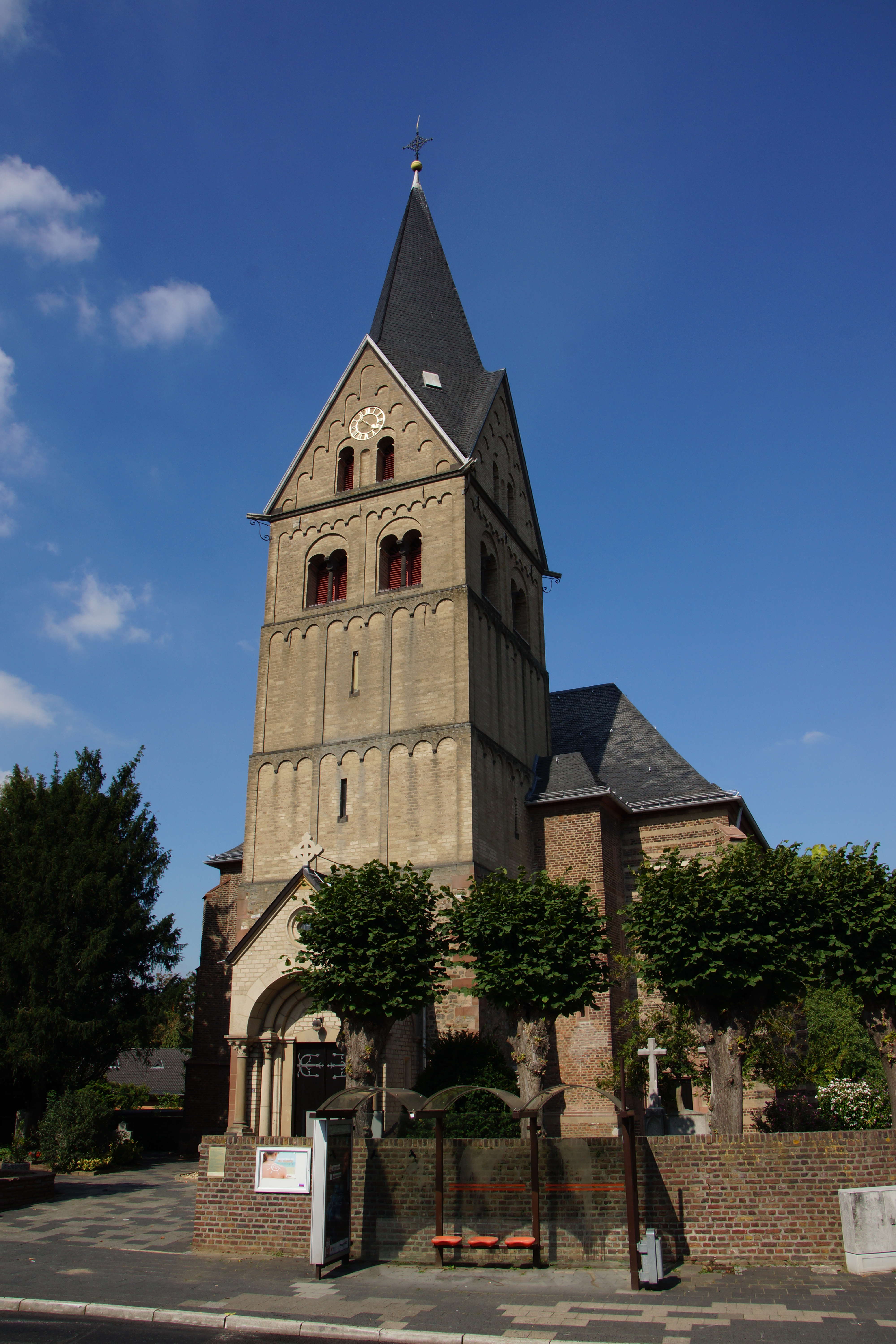 Sankt-Pankratius-Kirche (Paffendorf)